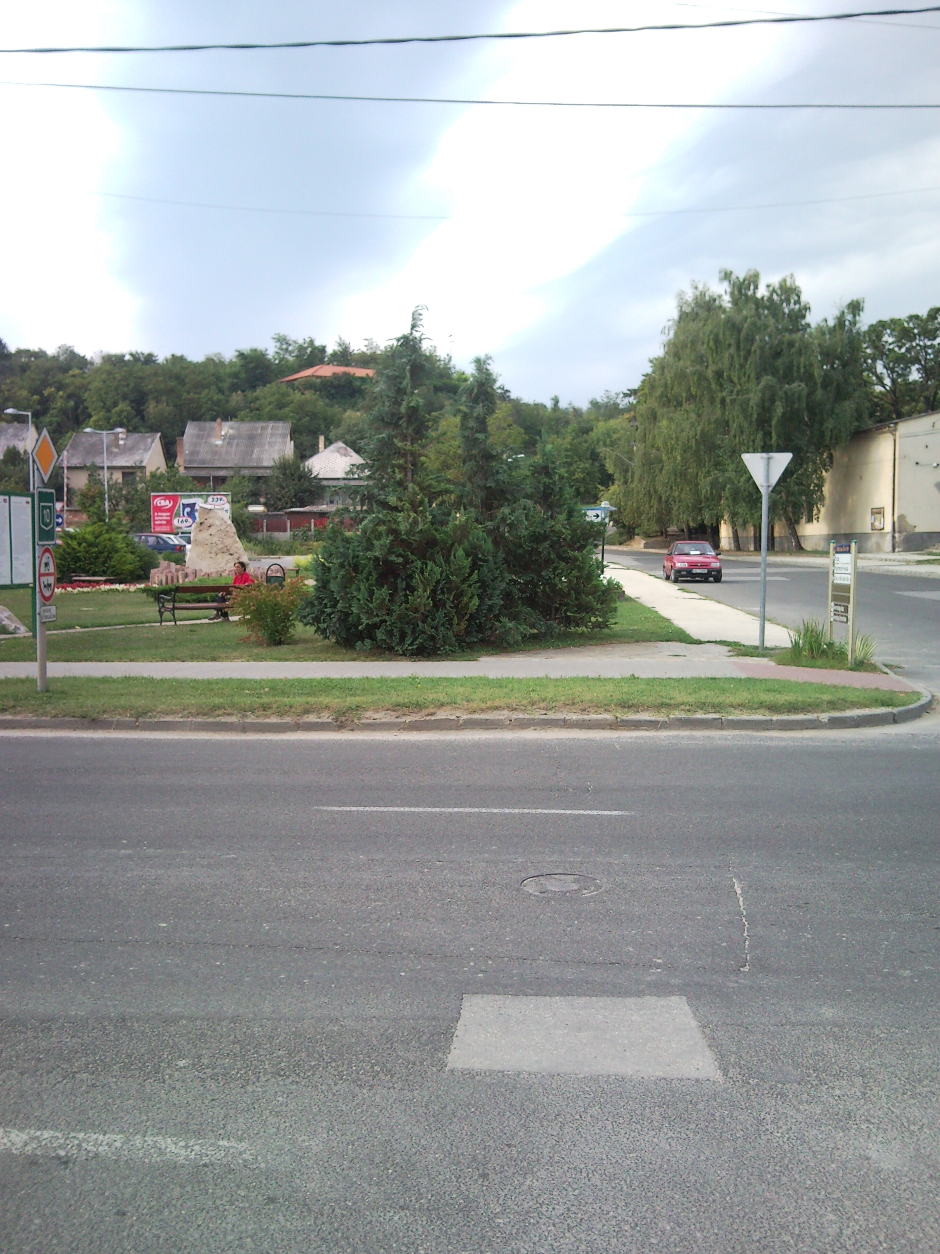 Lábatlan, Hungary